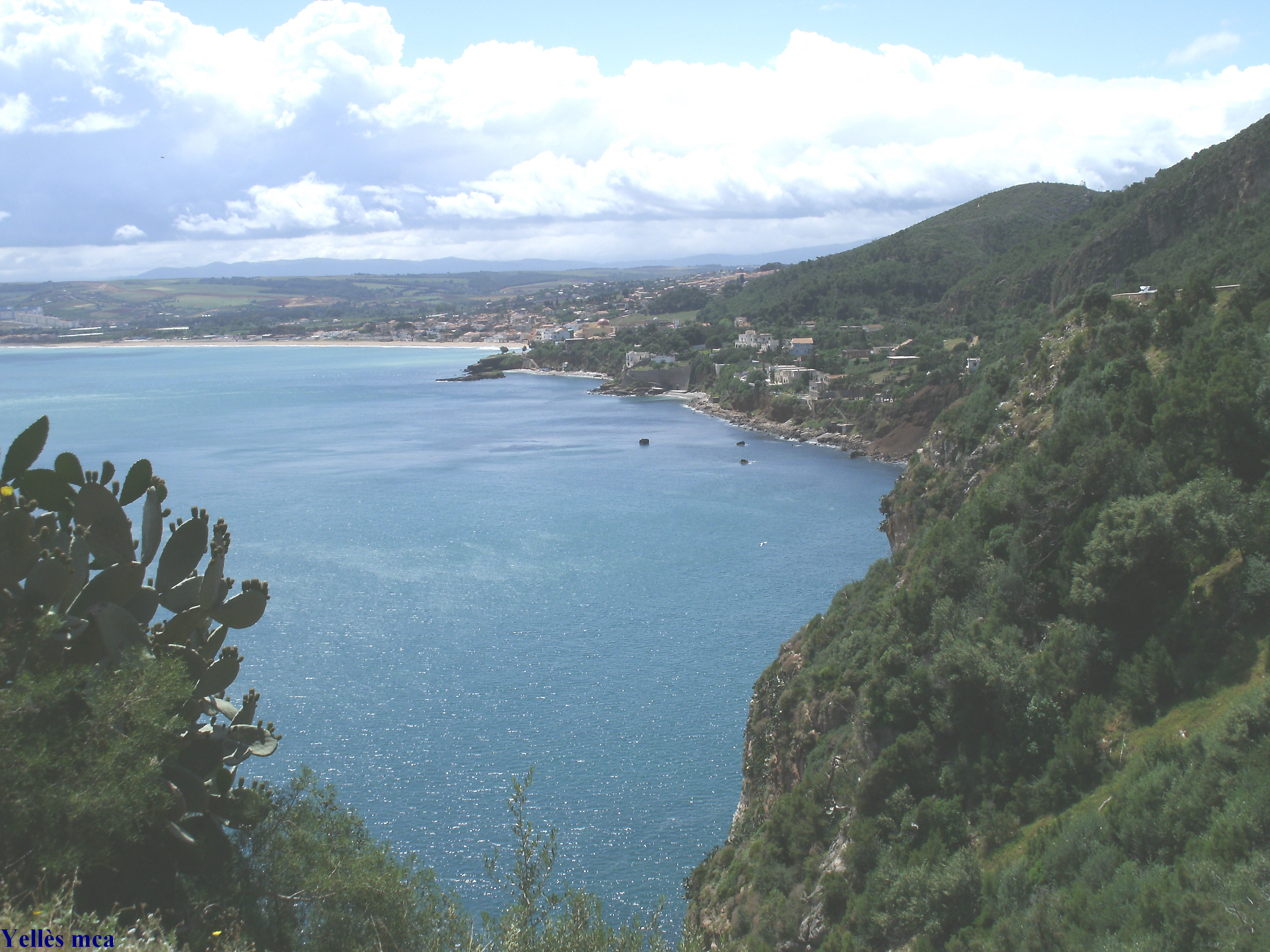 Au pied du Chenoua — Tipasa province.